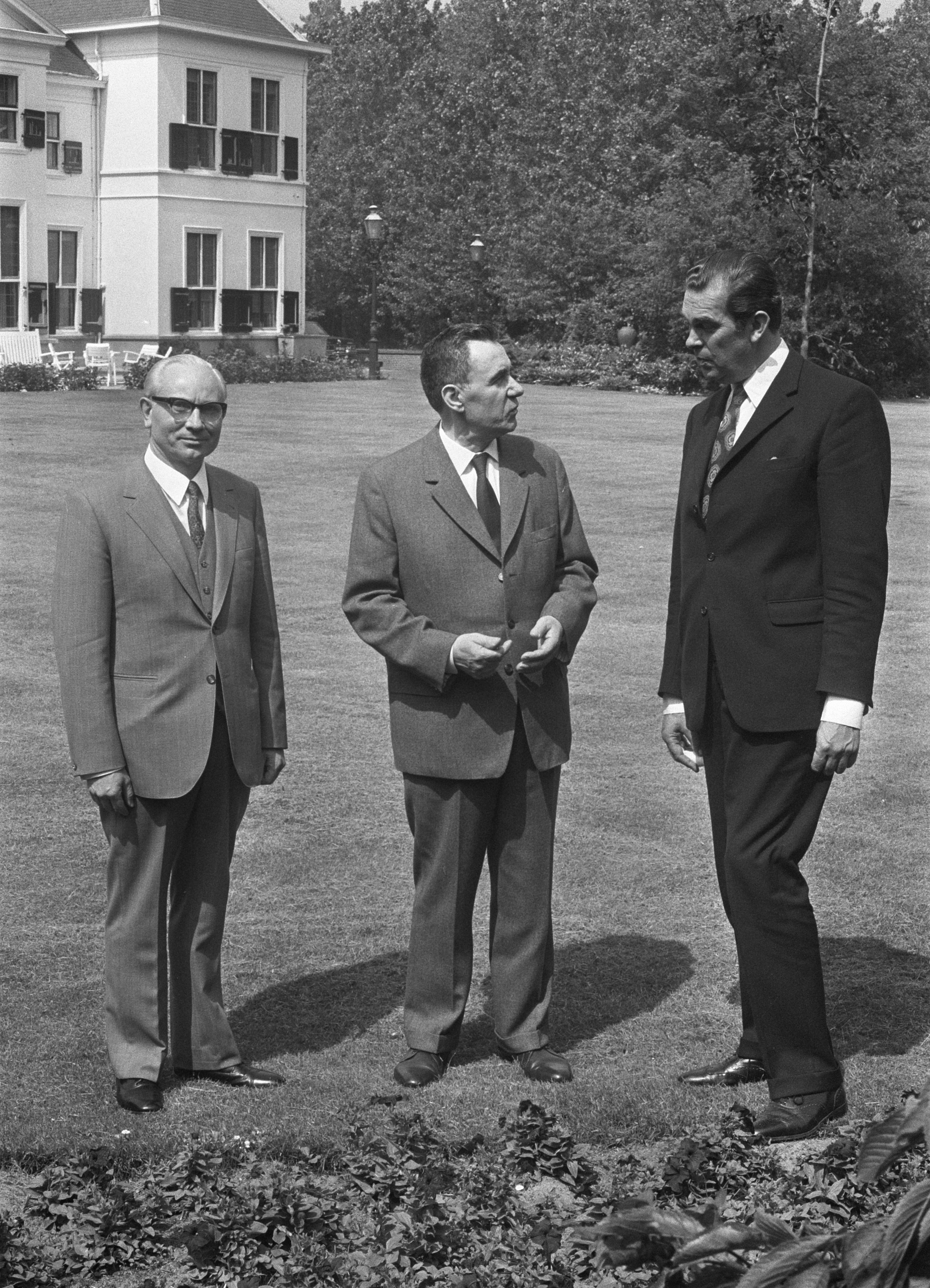 Premier Biesheuvel (rechts) ontvangt Gromyko op het Catshuis, begroeting